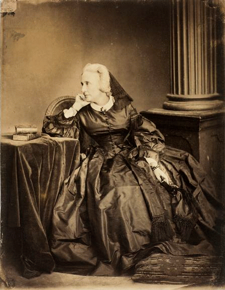 Portrait of Marie d'Agoult